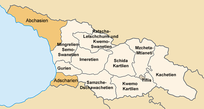 die 9 Regionen und die Hauptstadt Tiflis innerhalb Georgiens